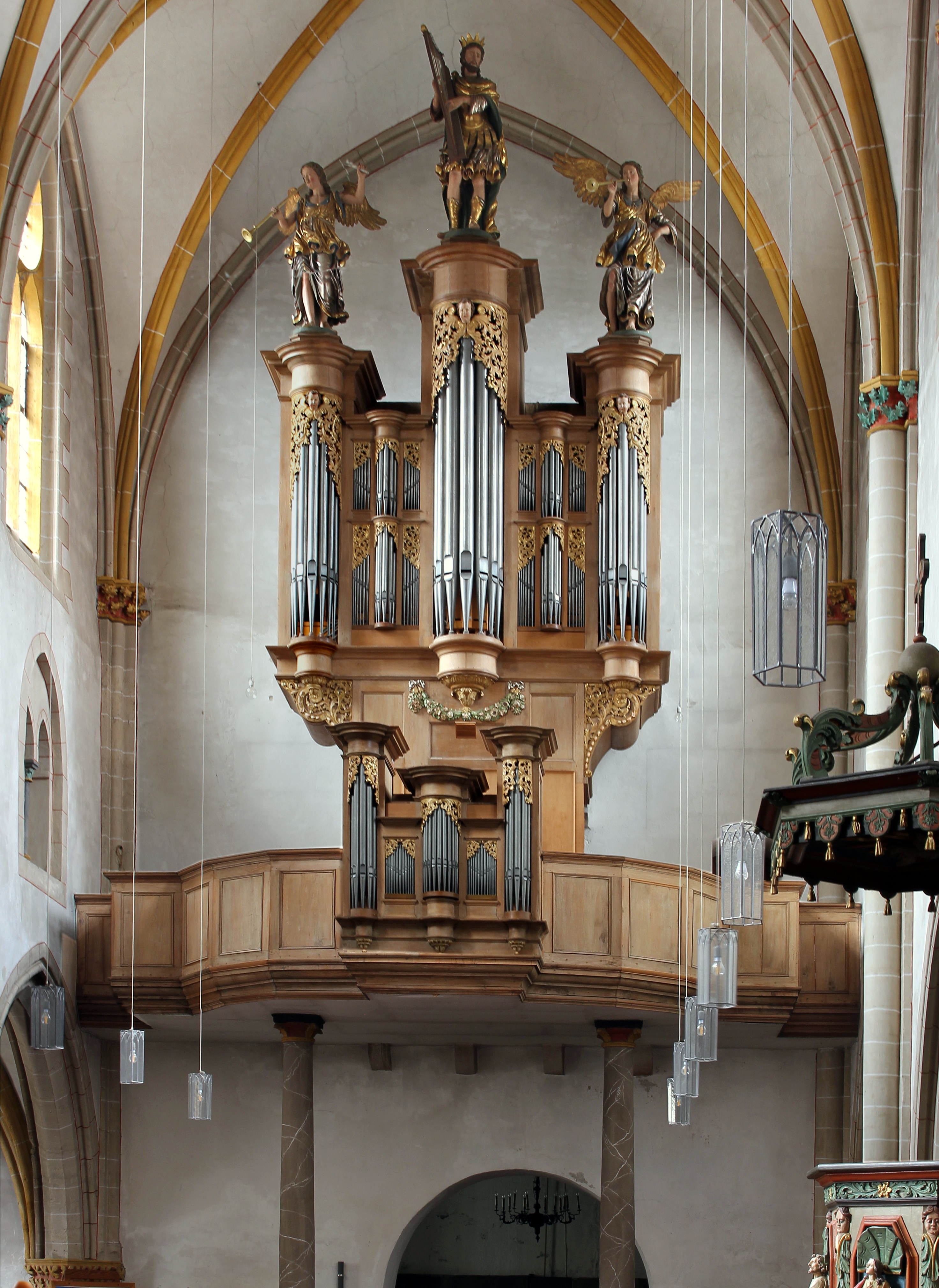 Stumm-Orgel in der ehemaligen Stiftskirche St. Castor in Karden